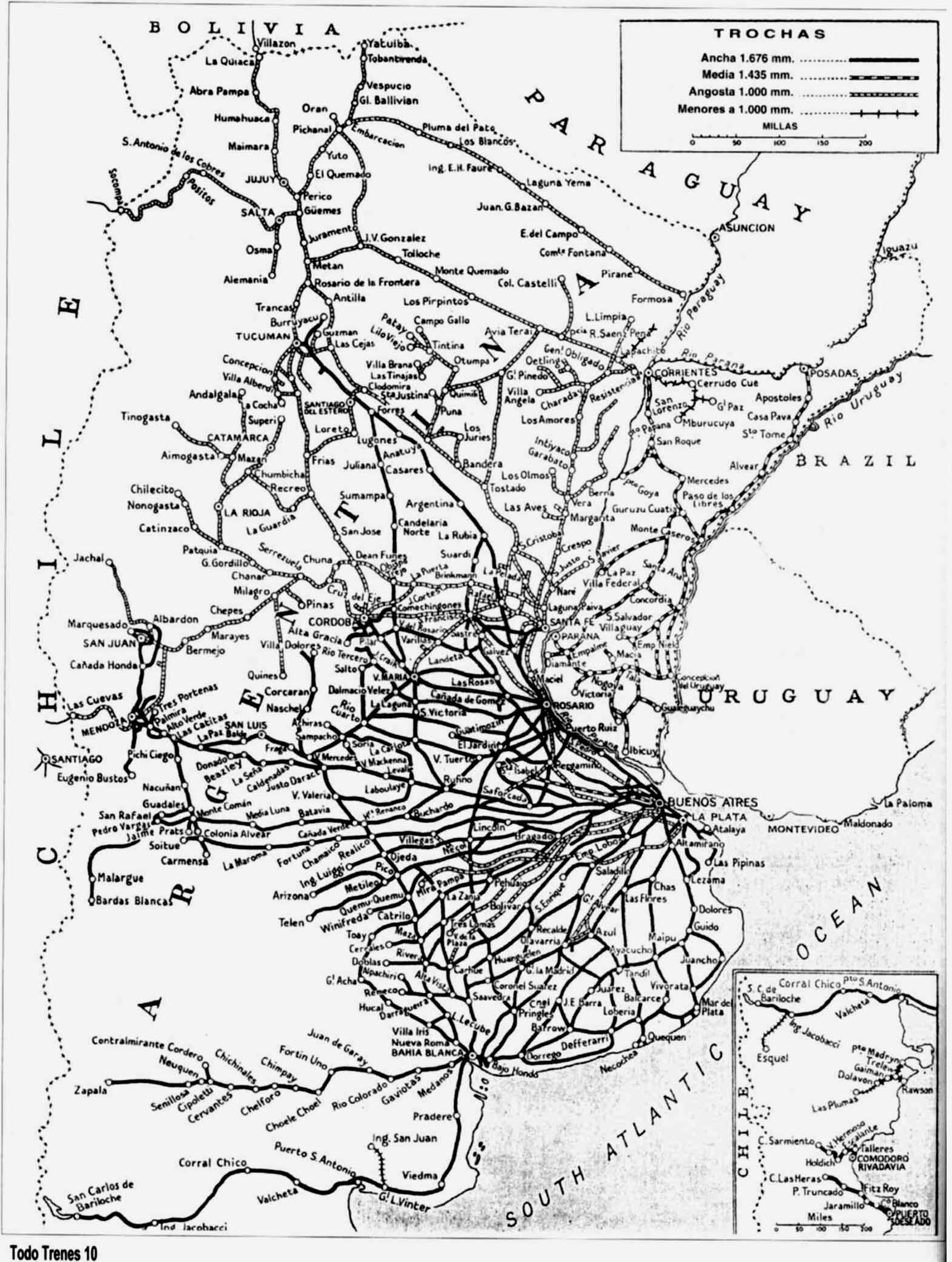 Mapa del Ferrocarril General Belgrano y el resto de la red ferroviaria argentina en el momento de su máxima extensión (aprox. 1960). En el recuadro inferior aparecen los ramales patagónicos al sur de la línea Viedma-Bariloche.